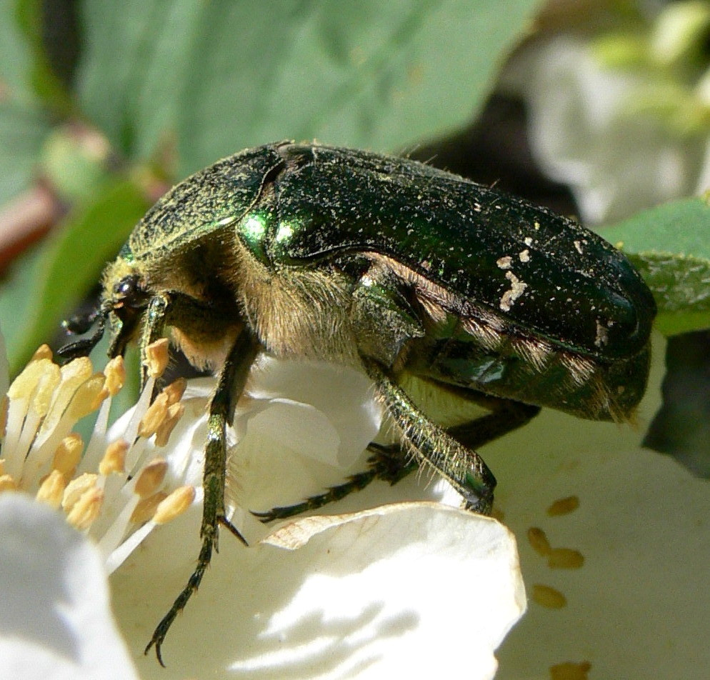 Cétoine dorée (Cetonia aurata) Auteurs : Jodelet/Lépinay